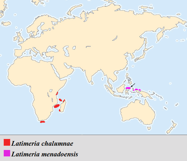 Ареал обитания латемерии Latimeria chalumnae, Latimeria menadoensis